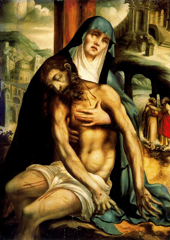 Pietà